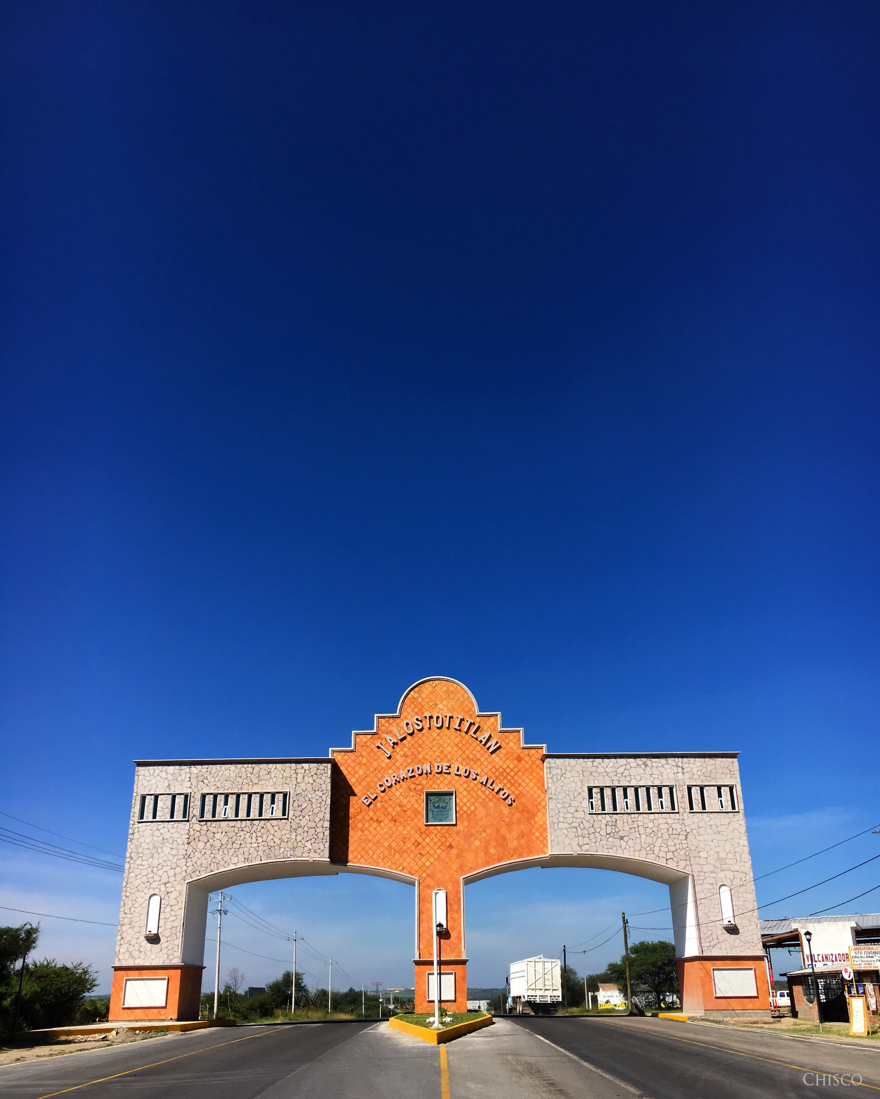 Arco Norte de Jalostotitlán